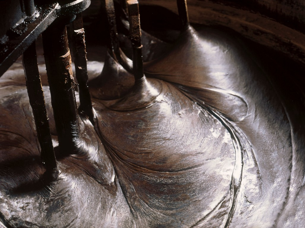 Particolare della conca di lavorazione della liquirizia in cui e' presentato il prodotto mentre viene impastato meccanicamente, Rossano (CS) sec. XX seconda meta' (Museo della Liquirizia Giorgio Amarelli, Fondo Amarelli)